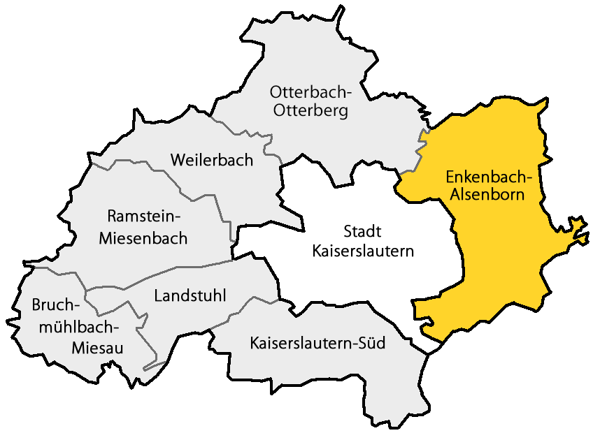 Karte der Verbandsgemeinde Enkenbach-Alsenborn im Landkreis Kaiserslautern